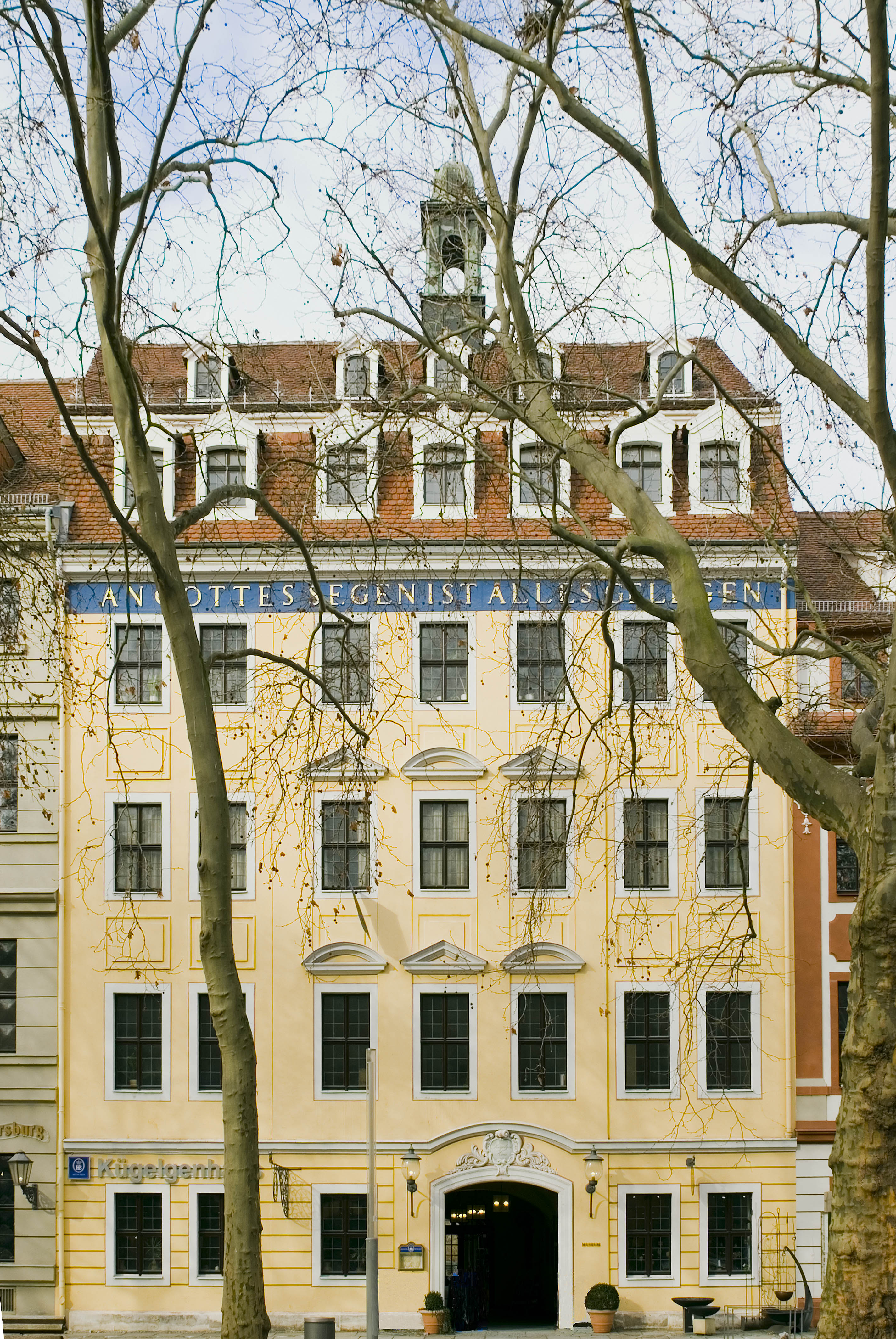 Das Kügelgenhaus mit dem Wahlspruch "AN GOTTES SEGEN IST ALLES GELEGEN".